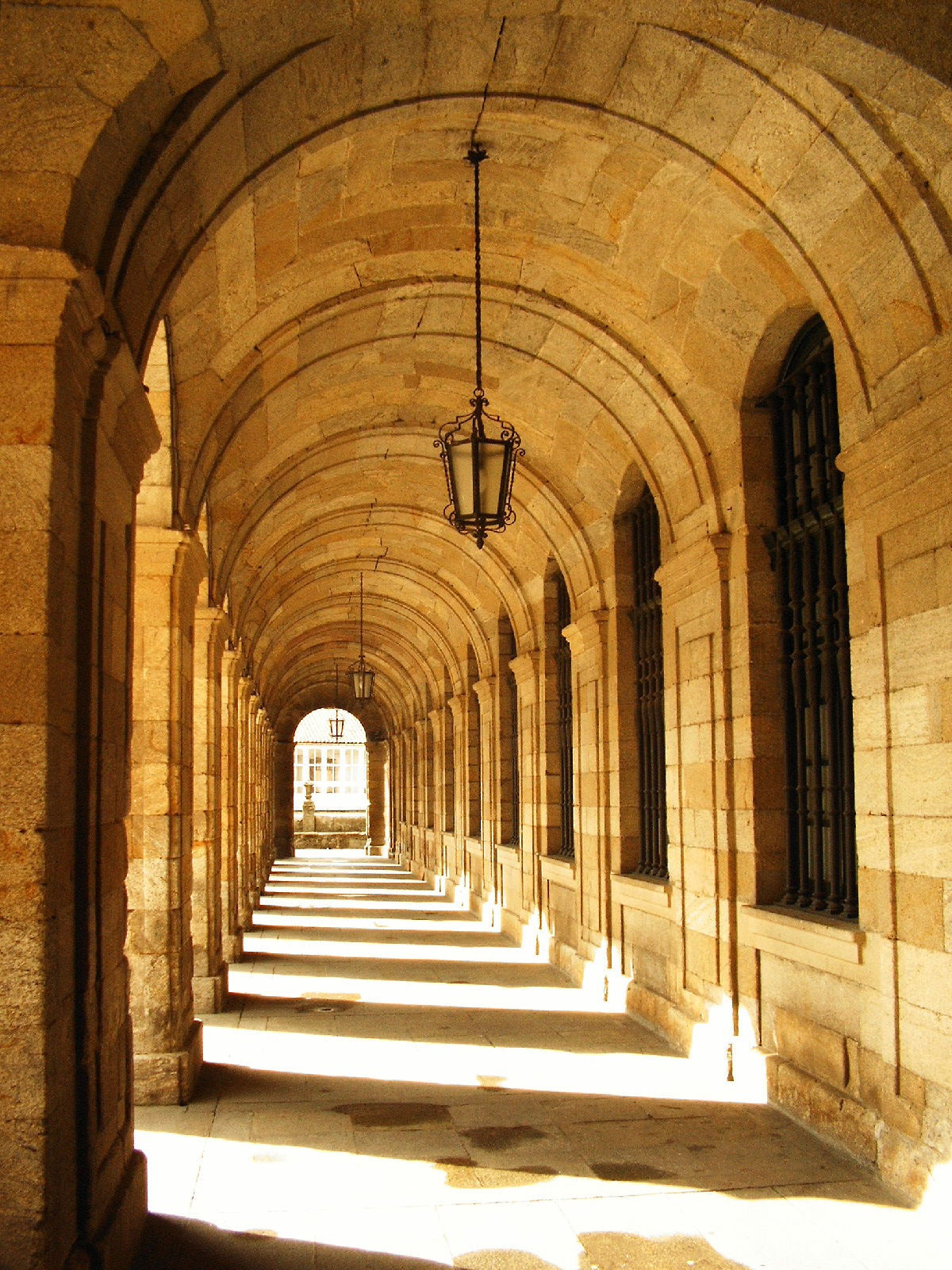 Pazo de Raxoi - Santiago de Compostela